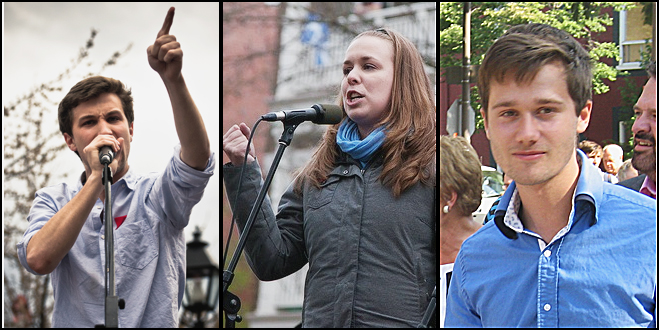 Gabriel Nadeau-Dubois, lors de la manifestation étudiante à la Place du Canada, Montréal, jeudi 22 mars.